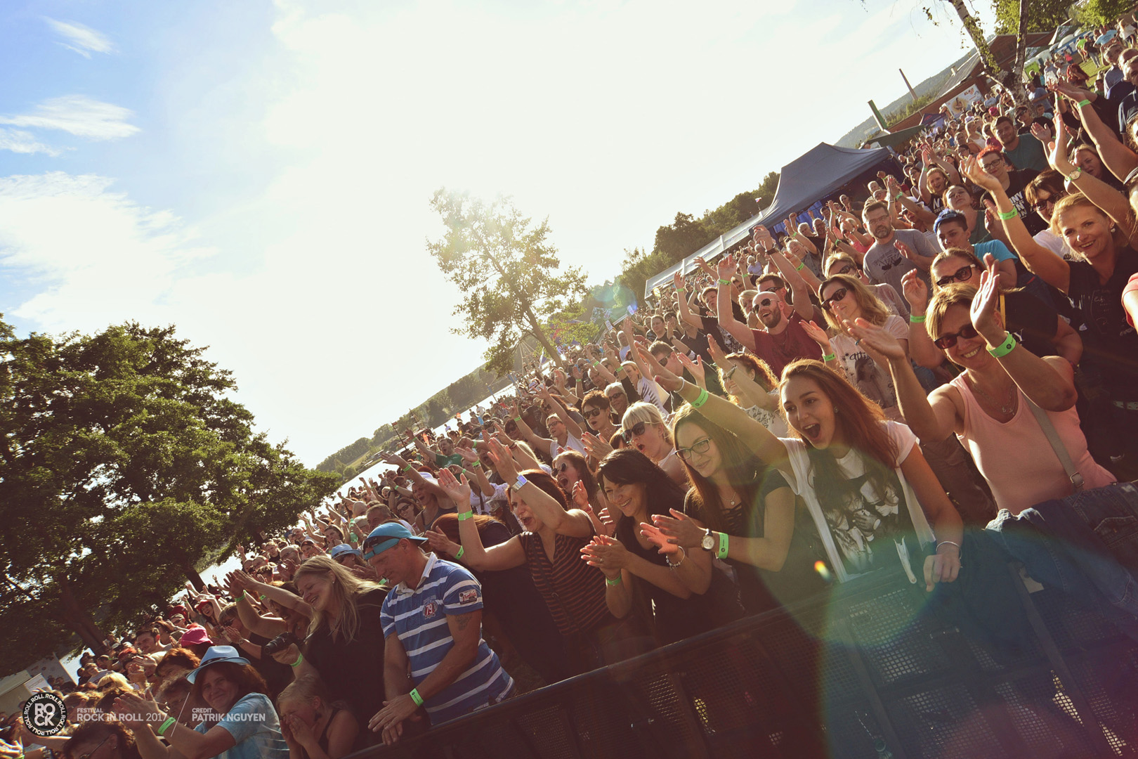 návštěvníci na festivalu Rock iN Roll 2017, Nová Role